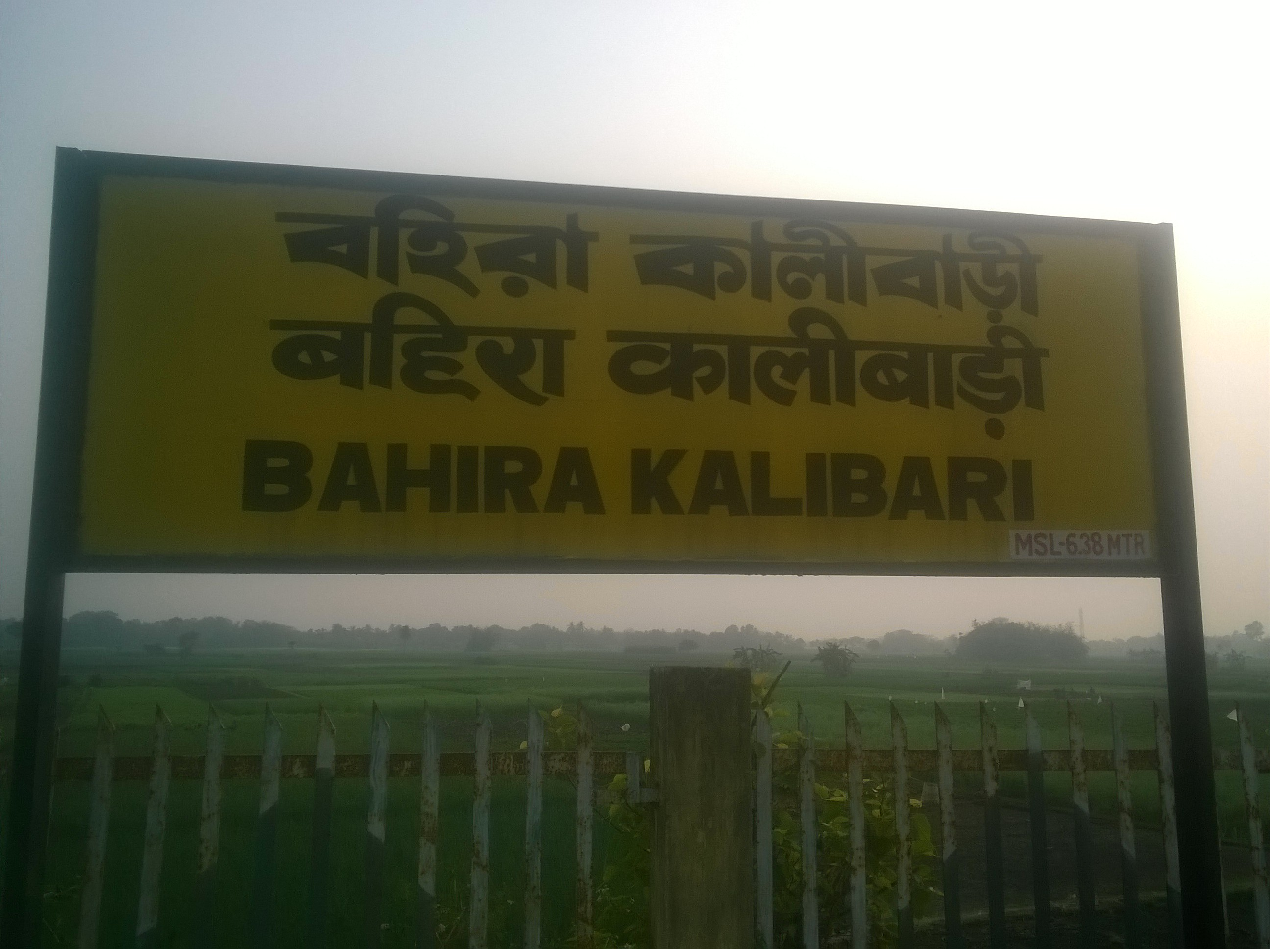 বাহিরা কালীবাড়ী রেল স্টেশন